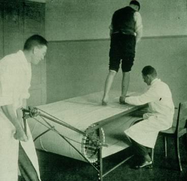 Бігова доріжка Річарда Щерба - перша в світі бігова доріжка